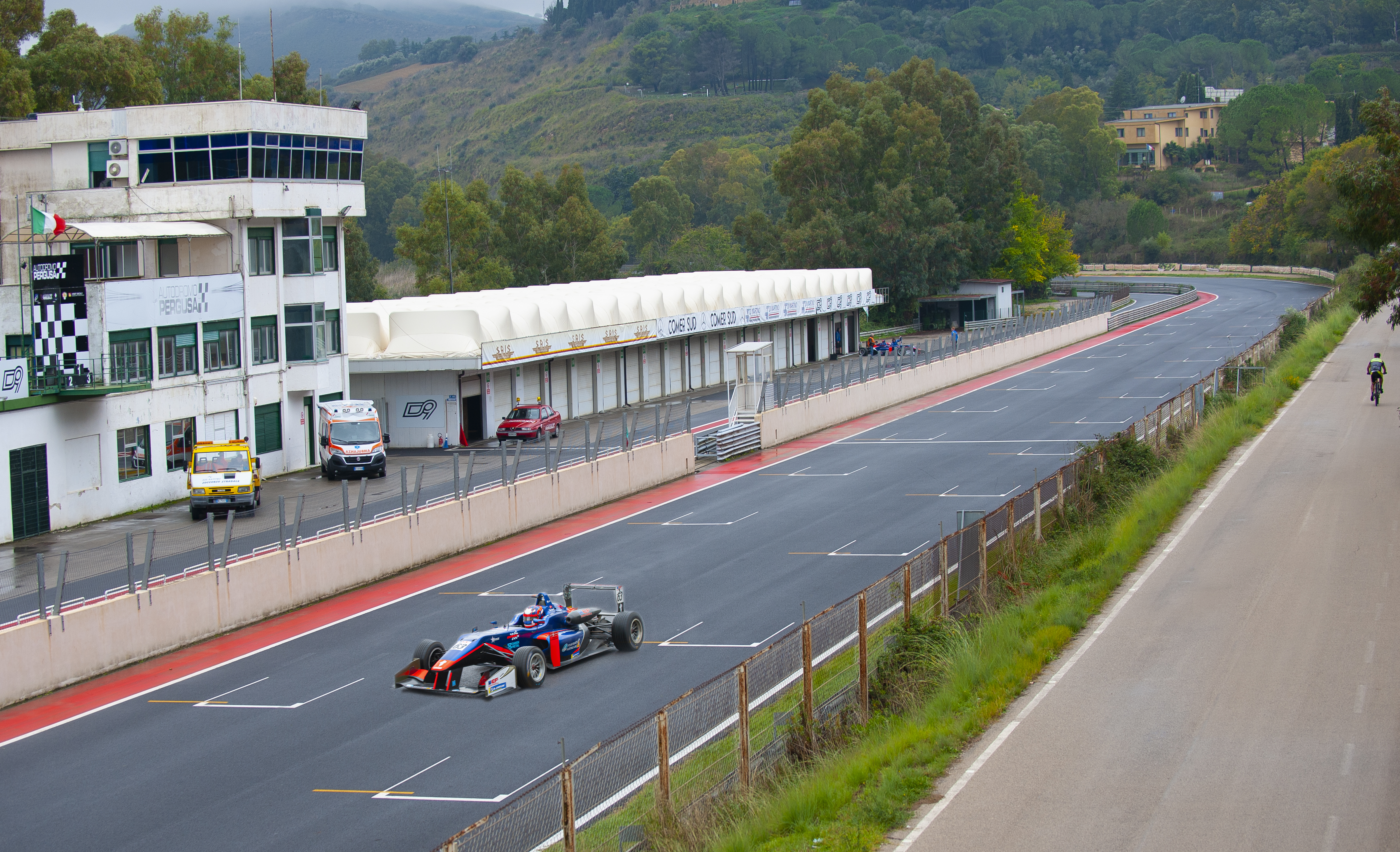 Autodromo Pergusa 4950 metri